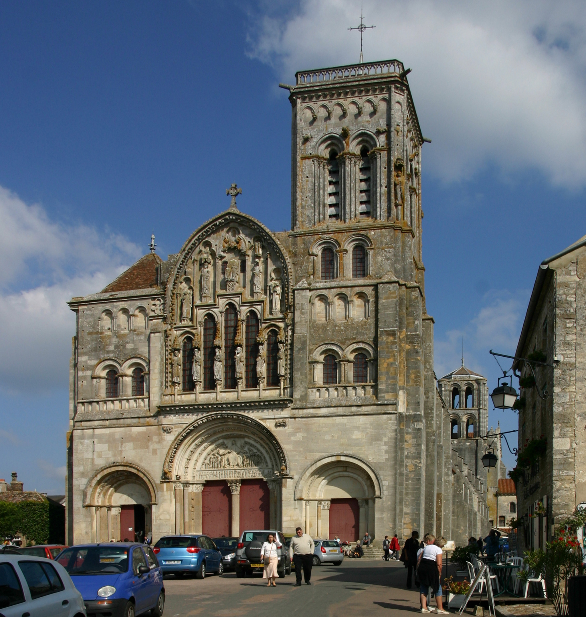 Vézelay, Basilika Sainte-Marie-Madeleine